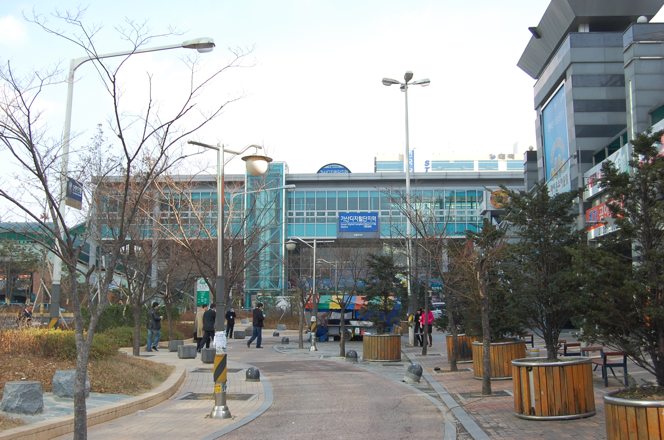 가산디지털단지역